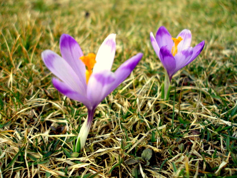 Šafran spišský (Crocus discolor). Horská trvalka s veľkým svetlofialovým kvetom vyrastajúcim z bazálnej hľuzy. Okvetné lístky majú pri hornom okraji tmavé škvrny. Listy dorastajú až po odkvitnutí, sú úzko čiarkovité, trávovitého vzhľadu, s bielym pásikom, dlhé asi 20 cm. Patrí ku kvetom skorej jari, často rozkvitá už aj v topiacom sa snehu. Obľubuje podhorské až subalpínske vlhké lúky. Kvitne v marci až máji.(Kol. autor. Z našej prírody 1984) Foto z obce Sedlice, okres Prešov, región Šariš.